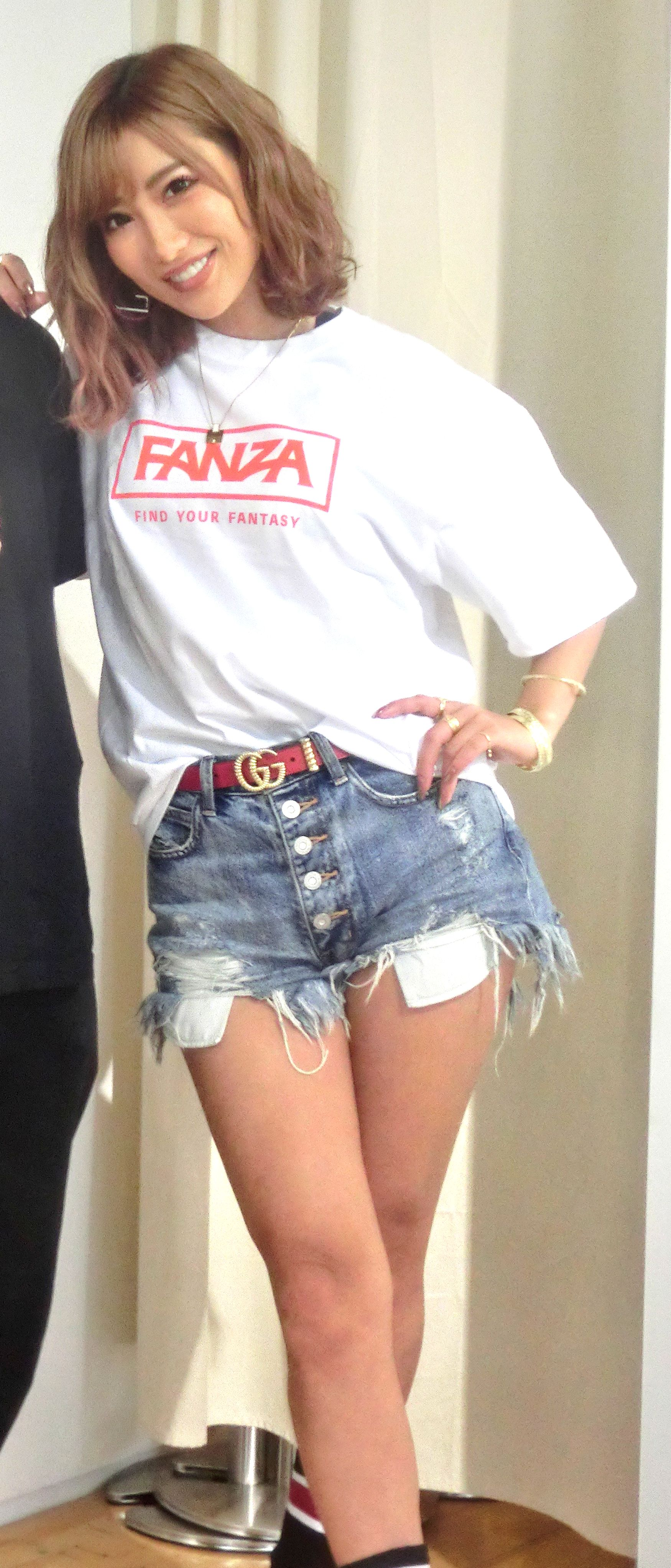 2018年9月16日、原宿FANZA#FR2 GALLERY2